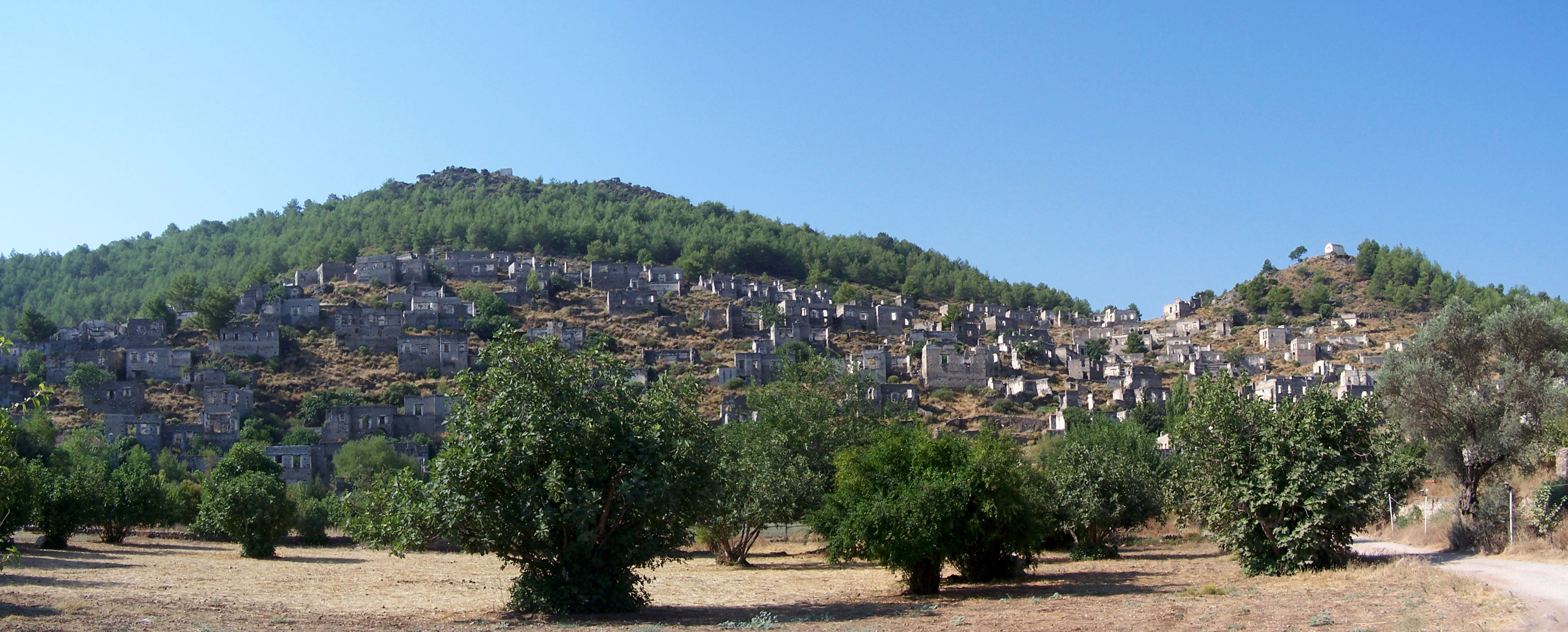 Kayaköy